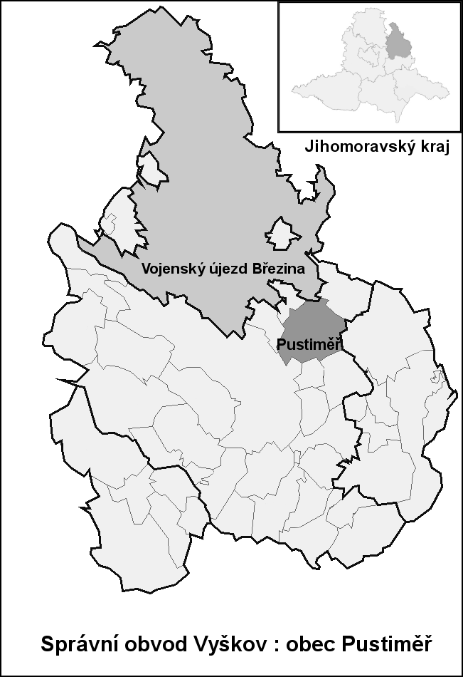 Hranice Pustiměř (Vyškov- czech republic)